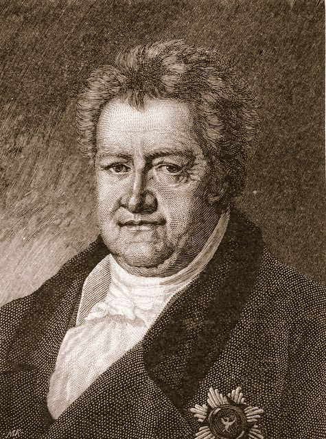 Karl August (3. September 1757 in Weimar; † 14. Juni 1828 in Graditz bei Torgau) war Herzog und Großherzog von Sachsen-Weimar-Eisenach.